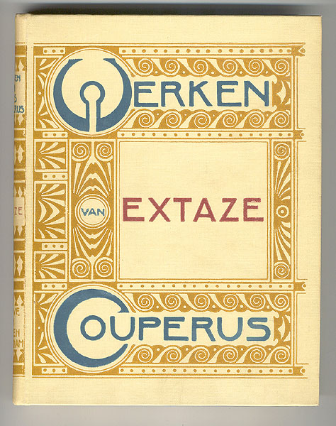 Boekomslag. "Extaze". 3e druk 1905. Auteur: L. Couperus. Bandontwerp: H.P. Berlage (serieband ‘Werken’). Uitgeverij: L.J. Veen.